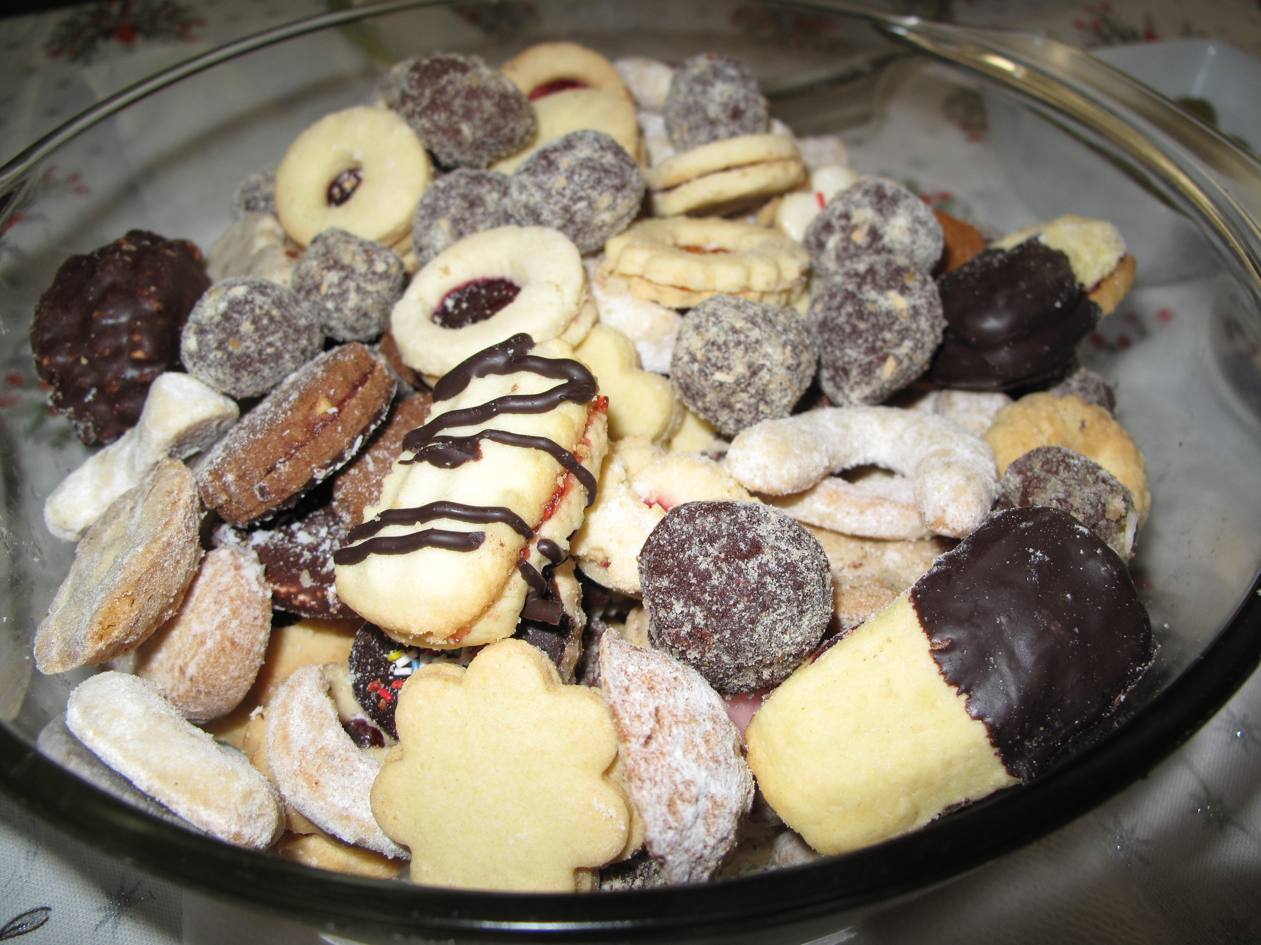 Různé druhy cukroví